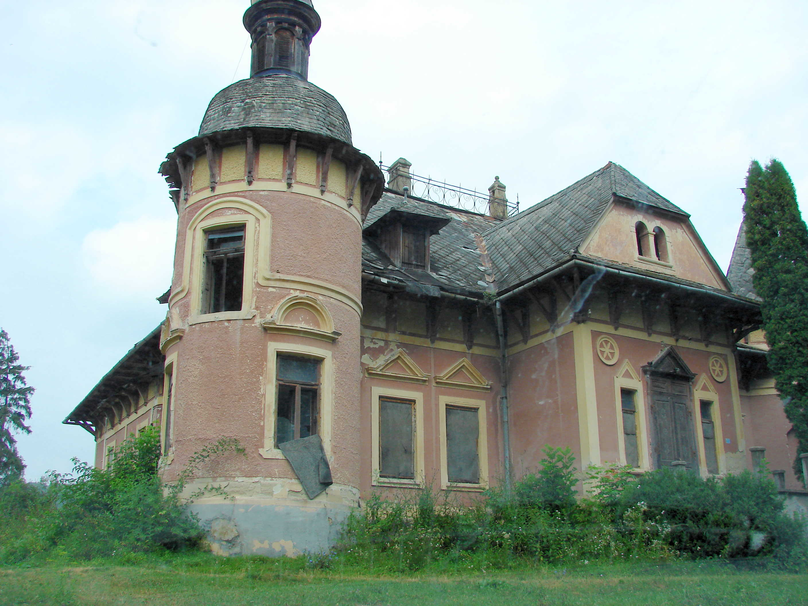 Poza 1